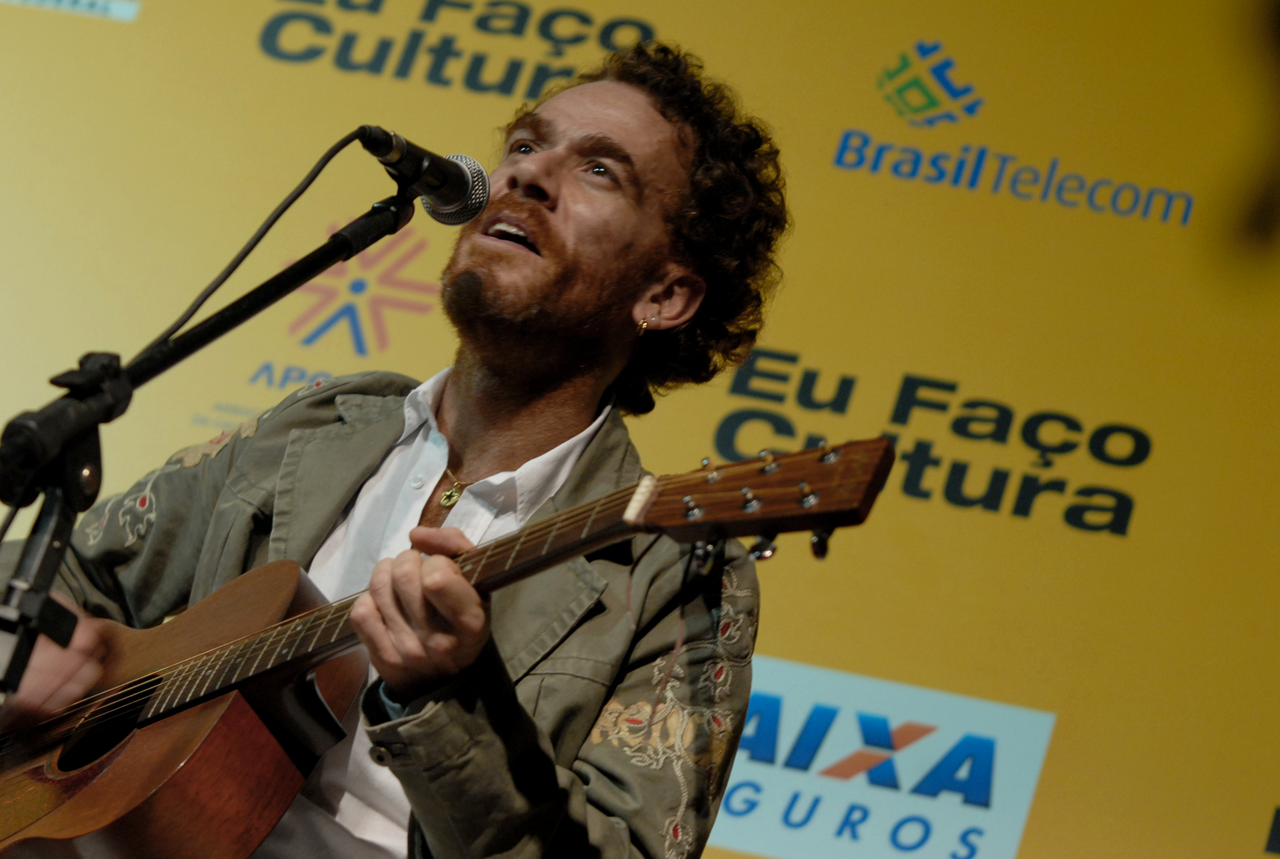 Brasília - O cantor Nando Reis no lançamento do projeto Eu Faço Cultura.